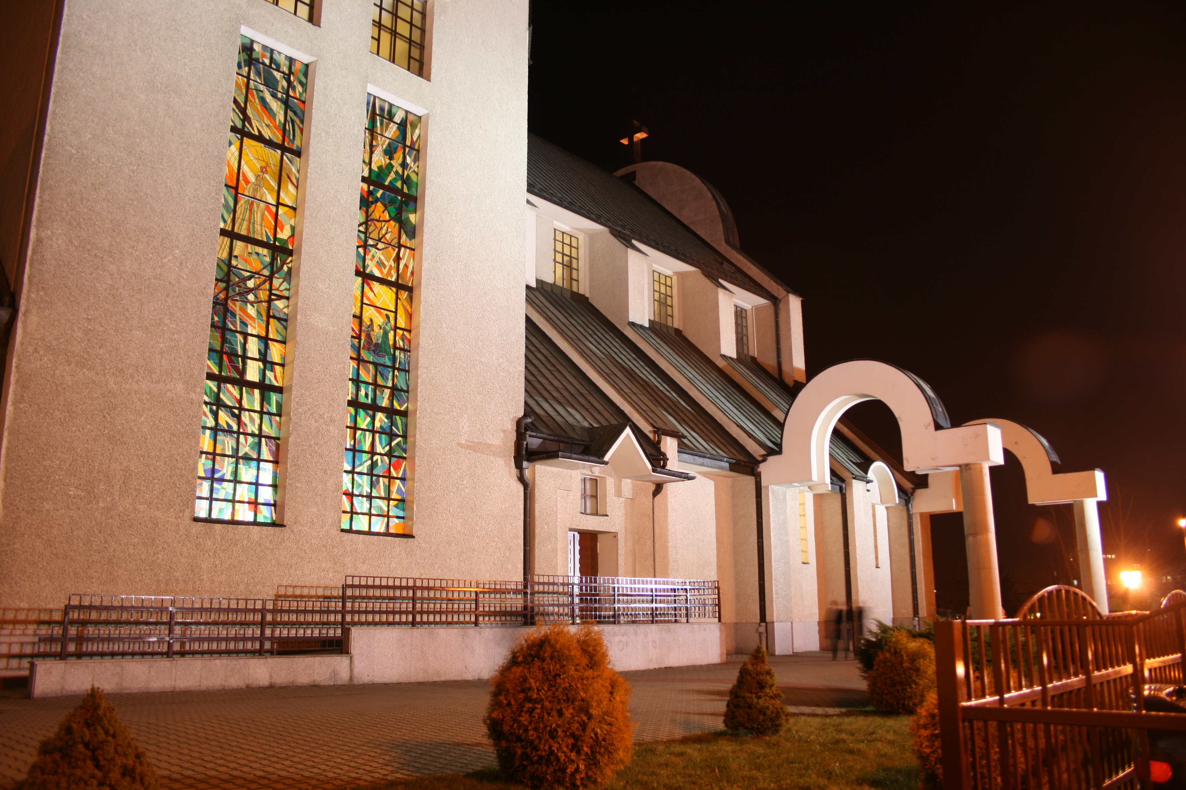 Kościół św. Piotra Apostoła w Wadowicach - ściana boczna z witarażami